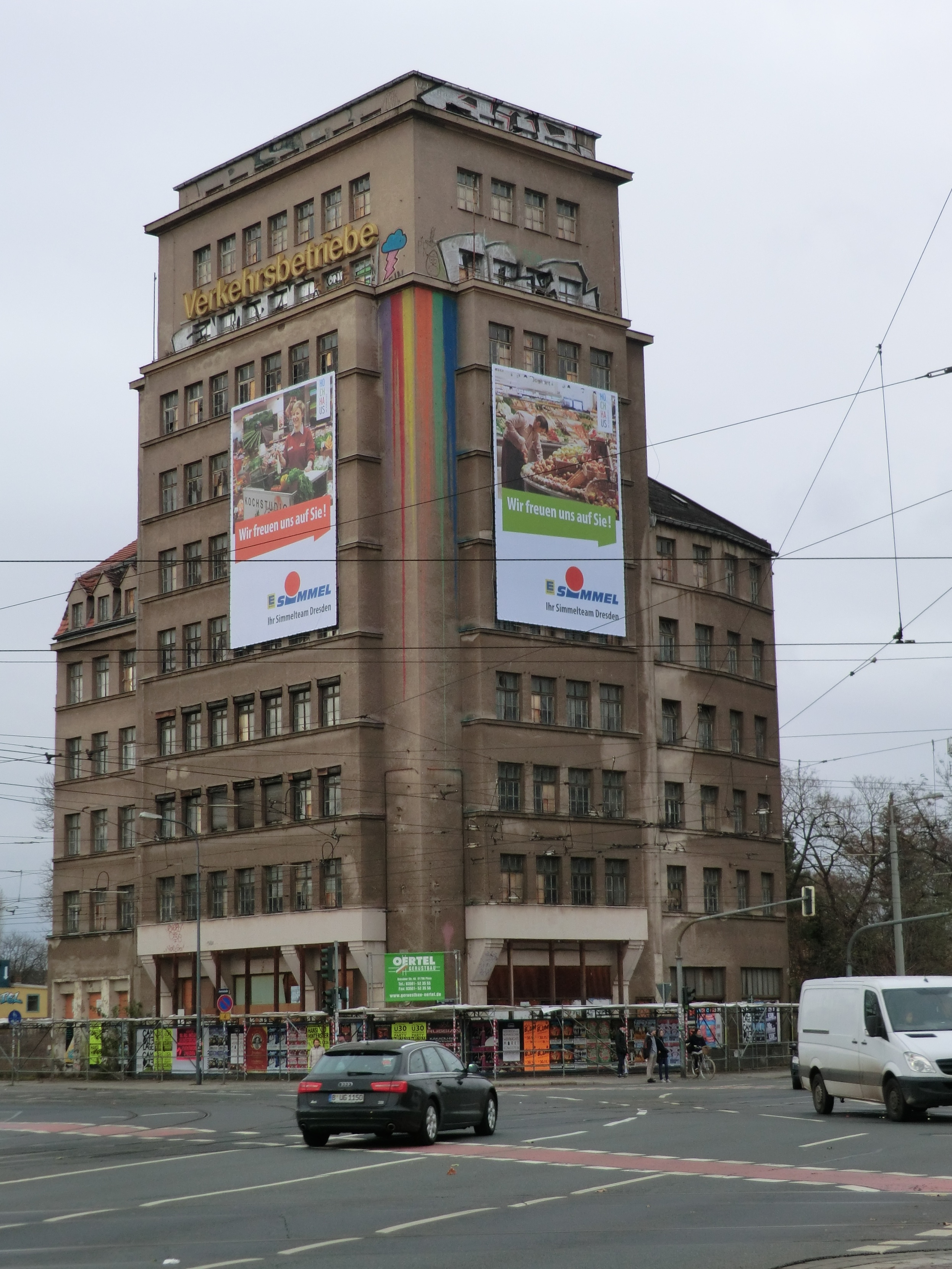 Verkehrsbetriebe Hochhaus Dresden (Dezember 2013)